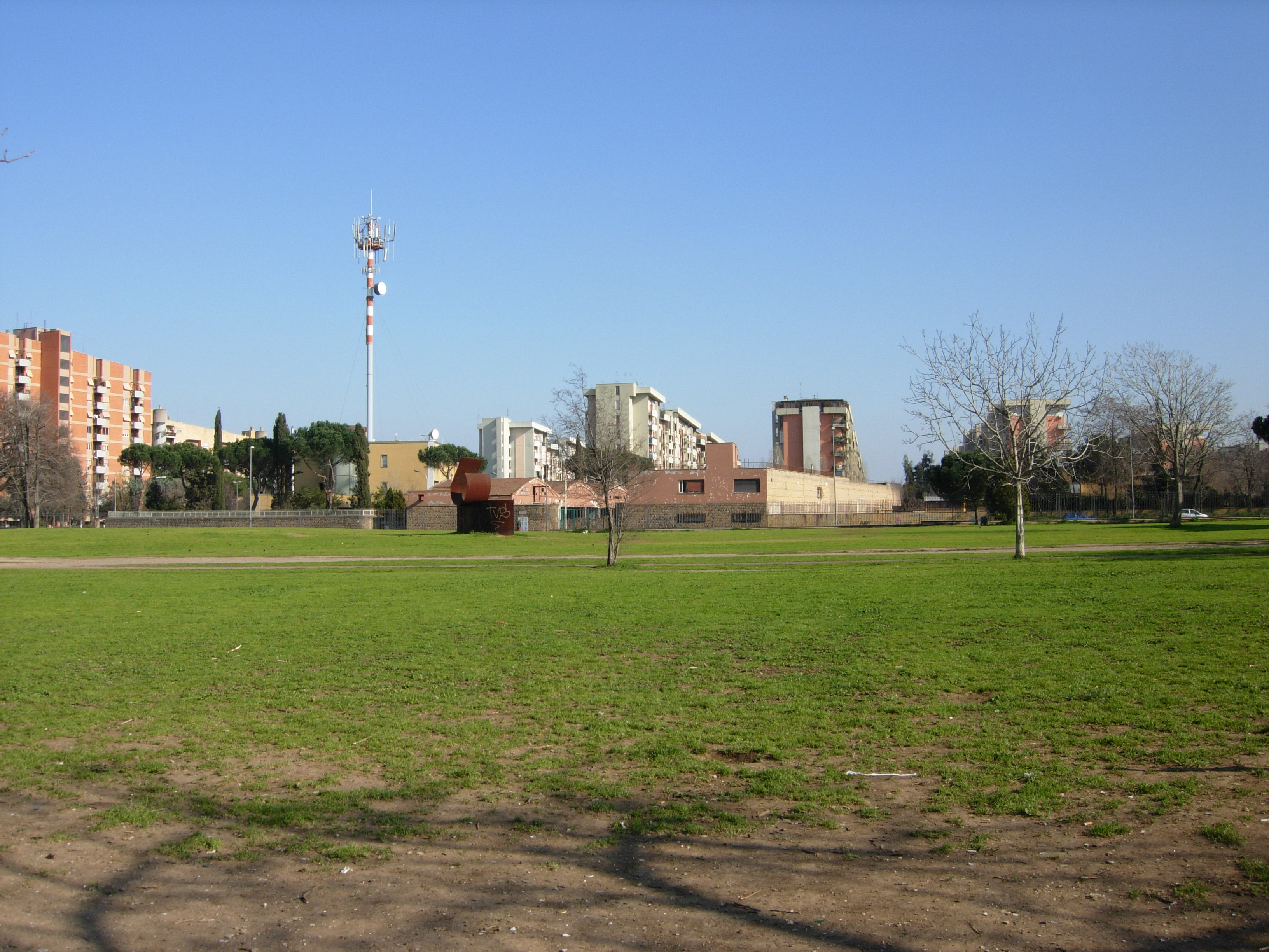 Roma - Villa de Santis Casilino 23